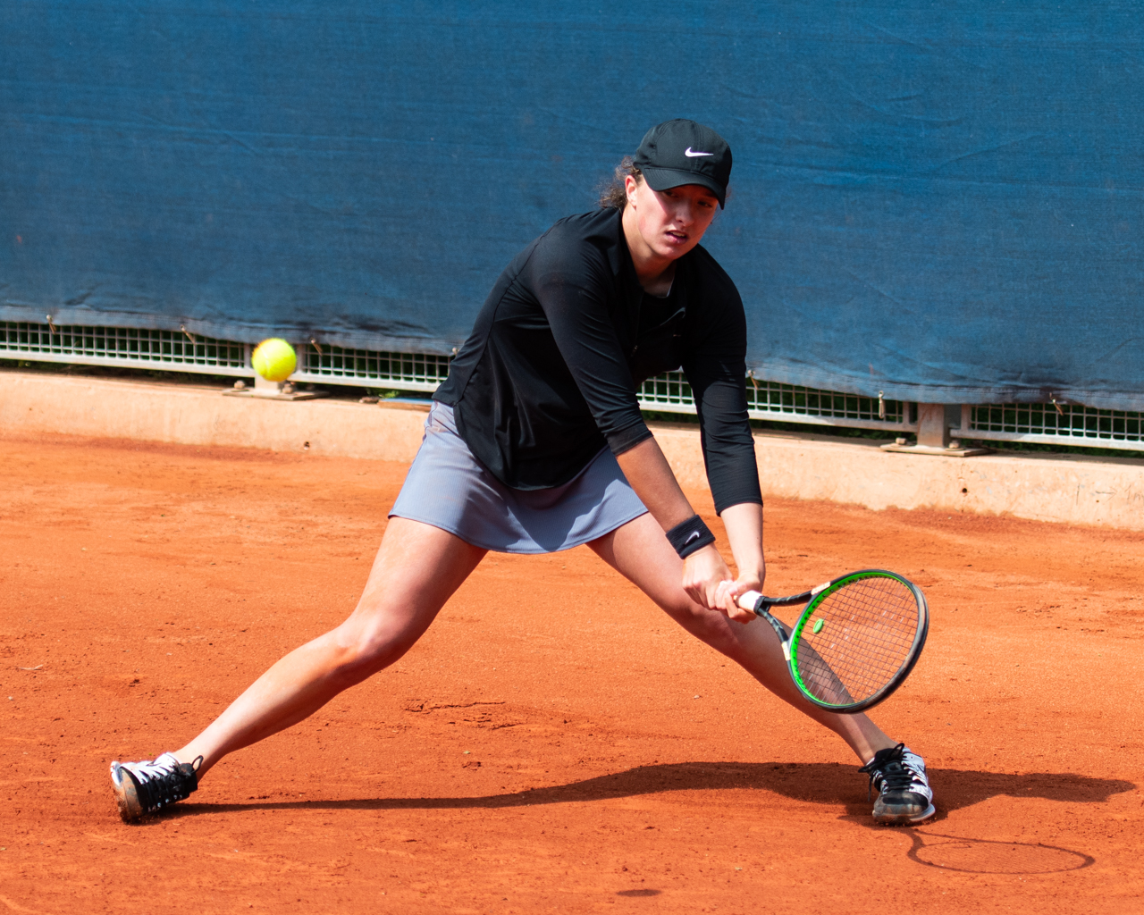 Iga Świątek